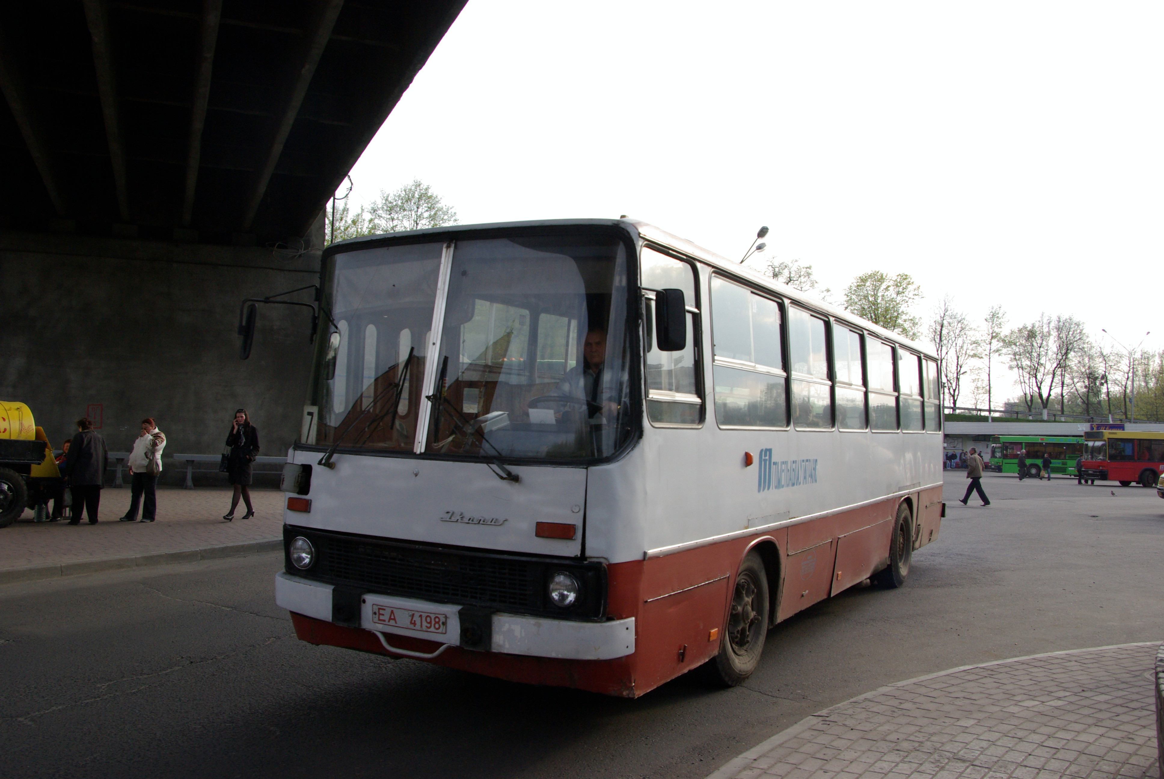 Mozyr tram fantrip. Мозырь - Mazyr, Belarus